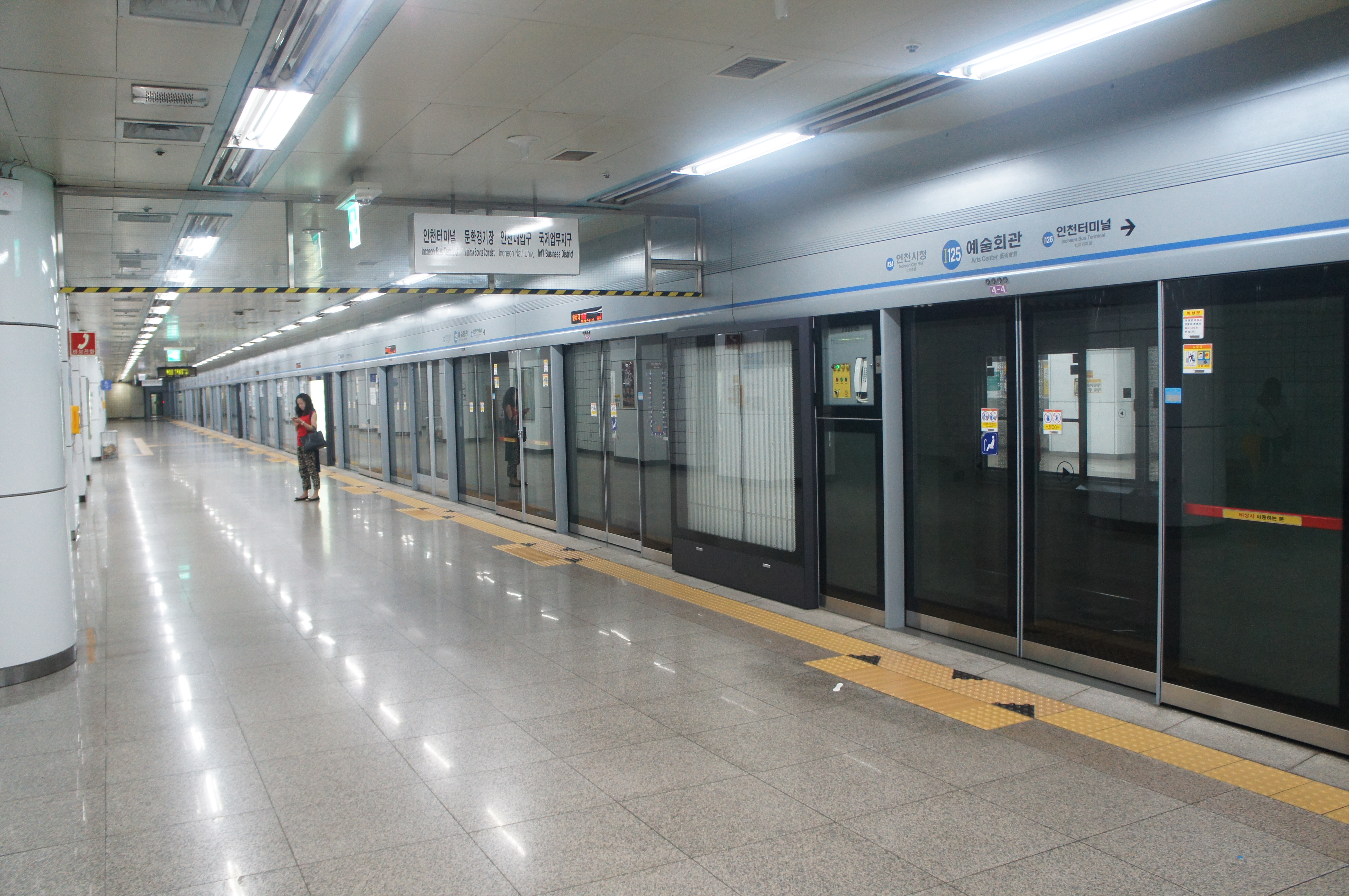 예술회관역 승강장